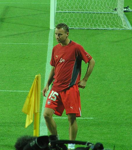 Tomasz Frankowski na rozgrzewce przed meczem Polska-Walia (wrzesień '05)